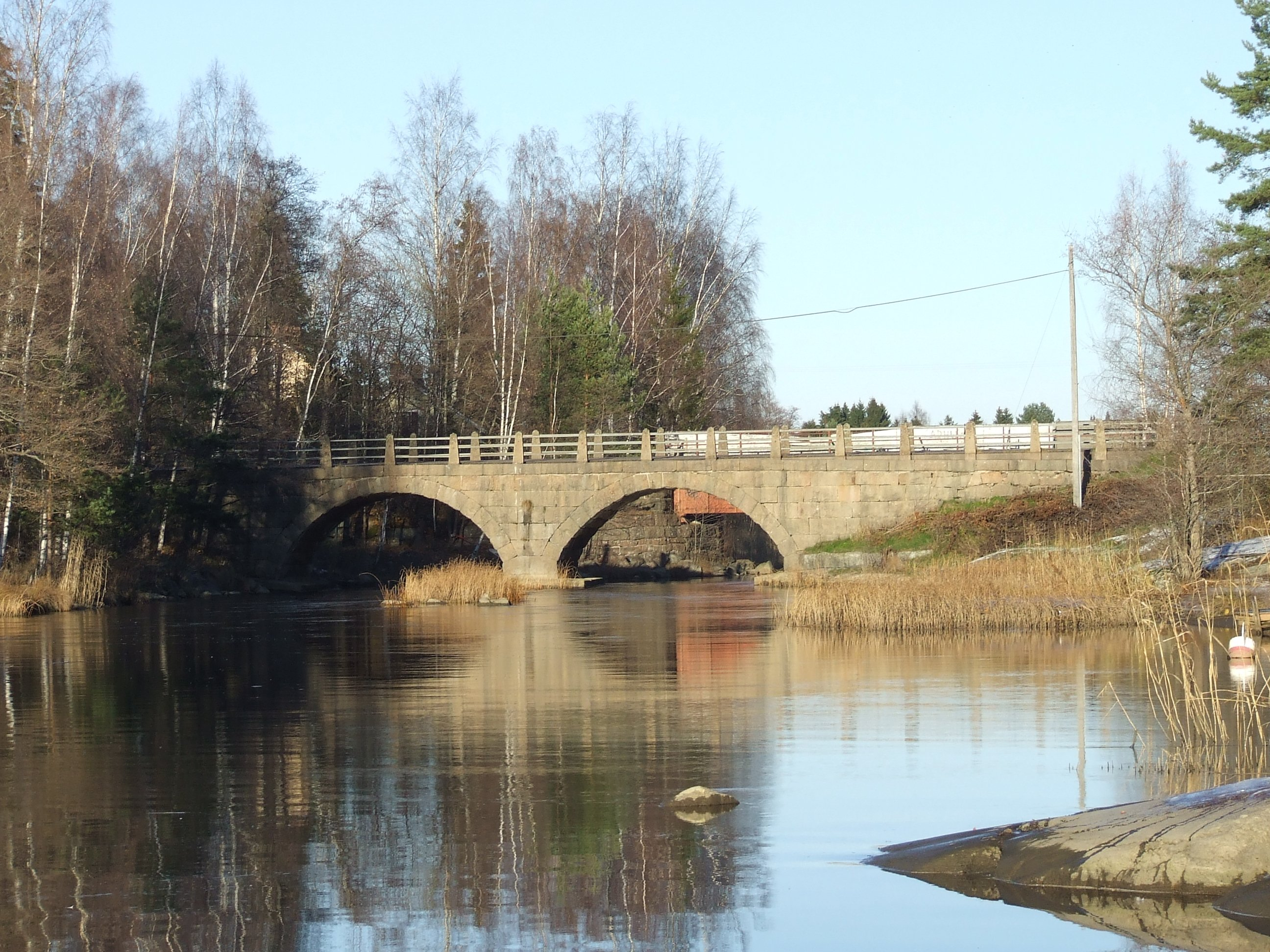 Salmenvirran silta Haminassa. Sillalta kaakkoon kohti Haminan keskustaa kulkee Mannerheimintie ja länsiluoteeseen Pirkantie.